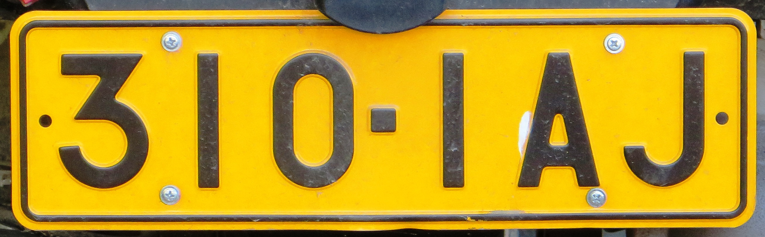 Tractor kentekenplaat Finland